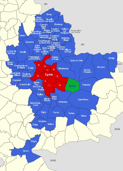 Communes du Grand Lyon, en vert Bron